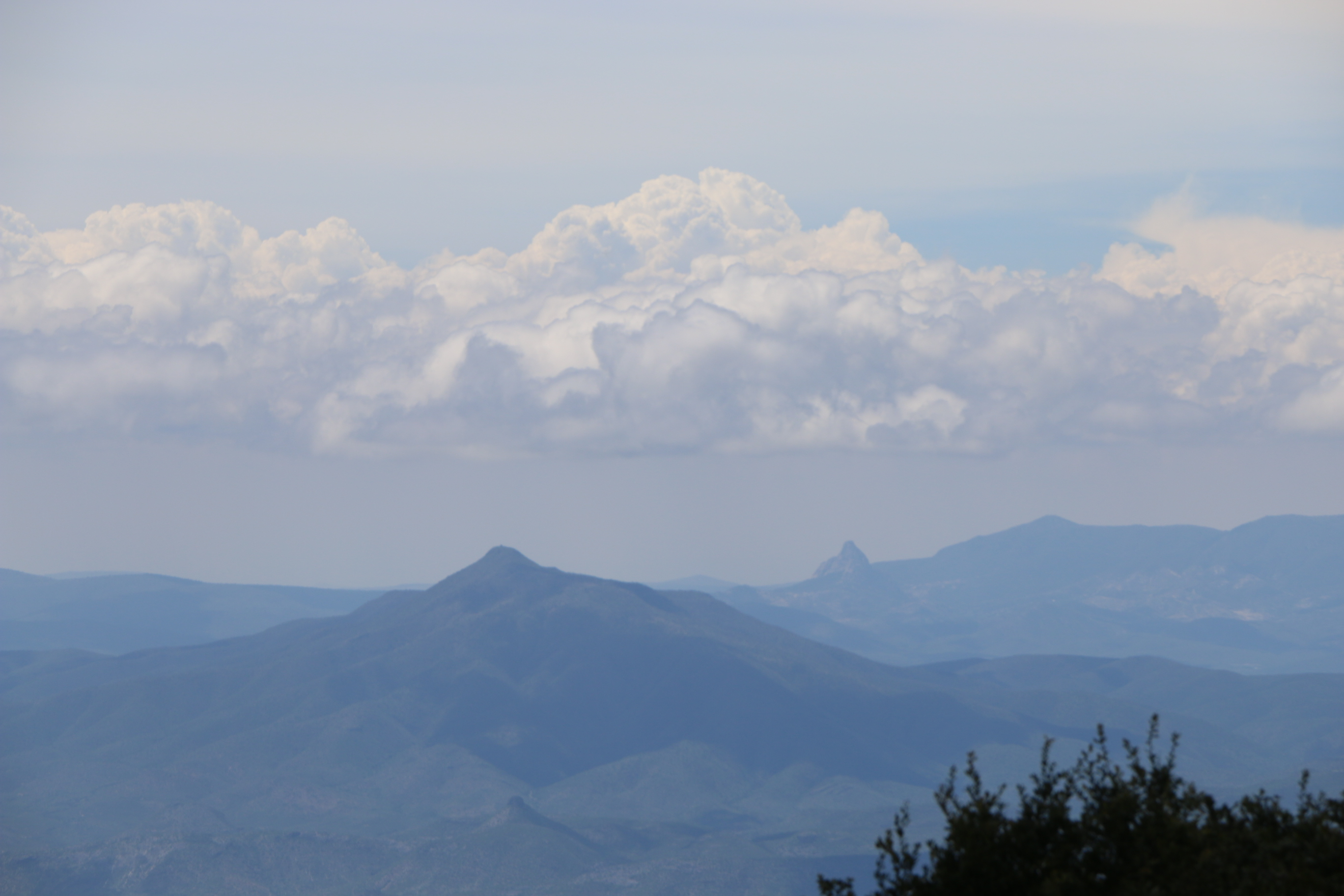 Vista de Peña de Bernal desde el mirador de Cuatro Palos